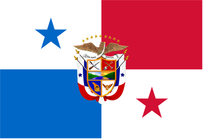 EStandarte presidencial de Panamá (Panama presidential standard)